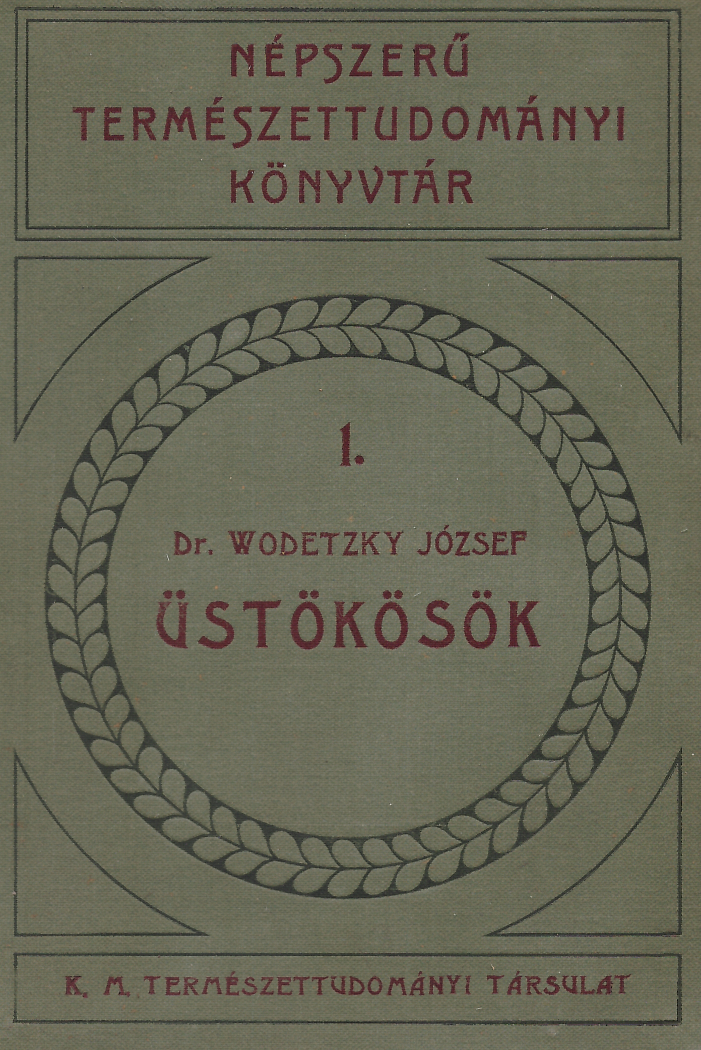 Wodetzky József: Üstökösök (1910, a borító készítője nem ismert)